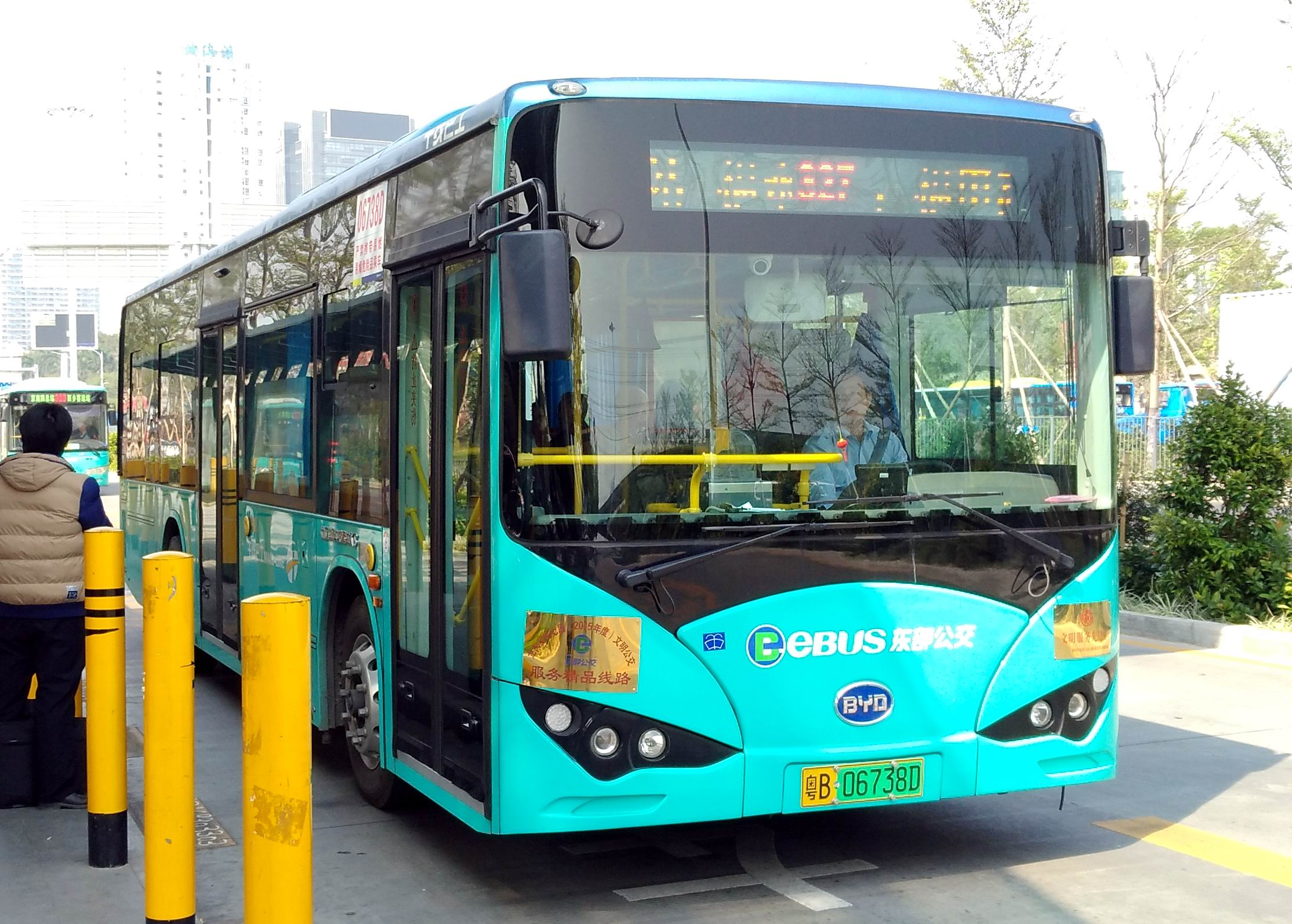 深圳公交 东部公交 327路 比亚迪K8 粤B06738D